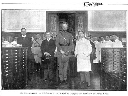 Carlos Chagas, o presidente brasileiro Epitácio Pessoa e o rei Alberto I da Bélgica (1920)